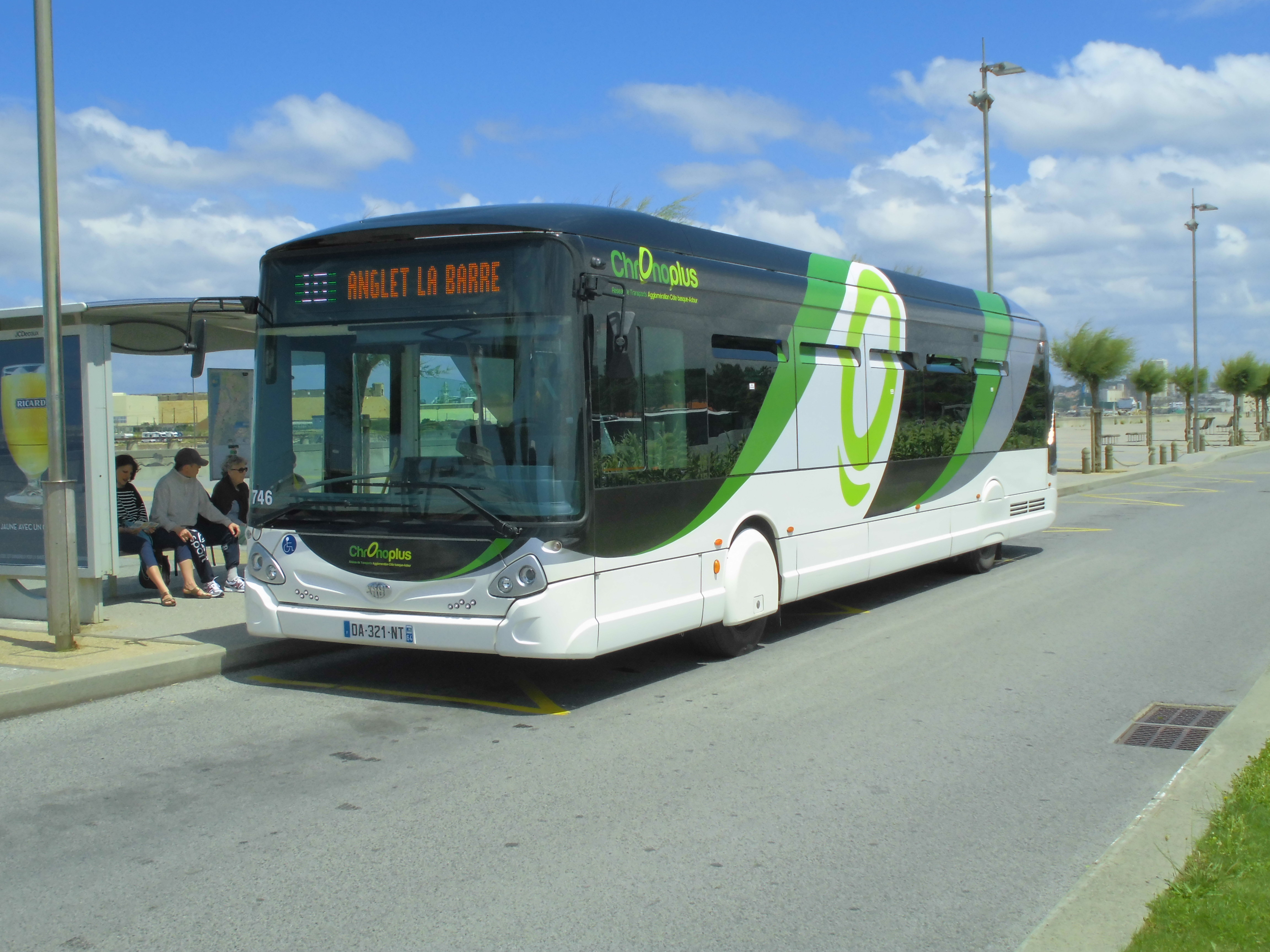 Bus Chronoplus sur la ligne 10 au terminus Anglet La Barre.